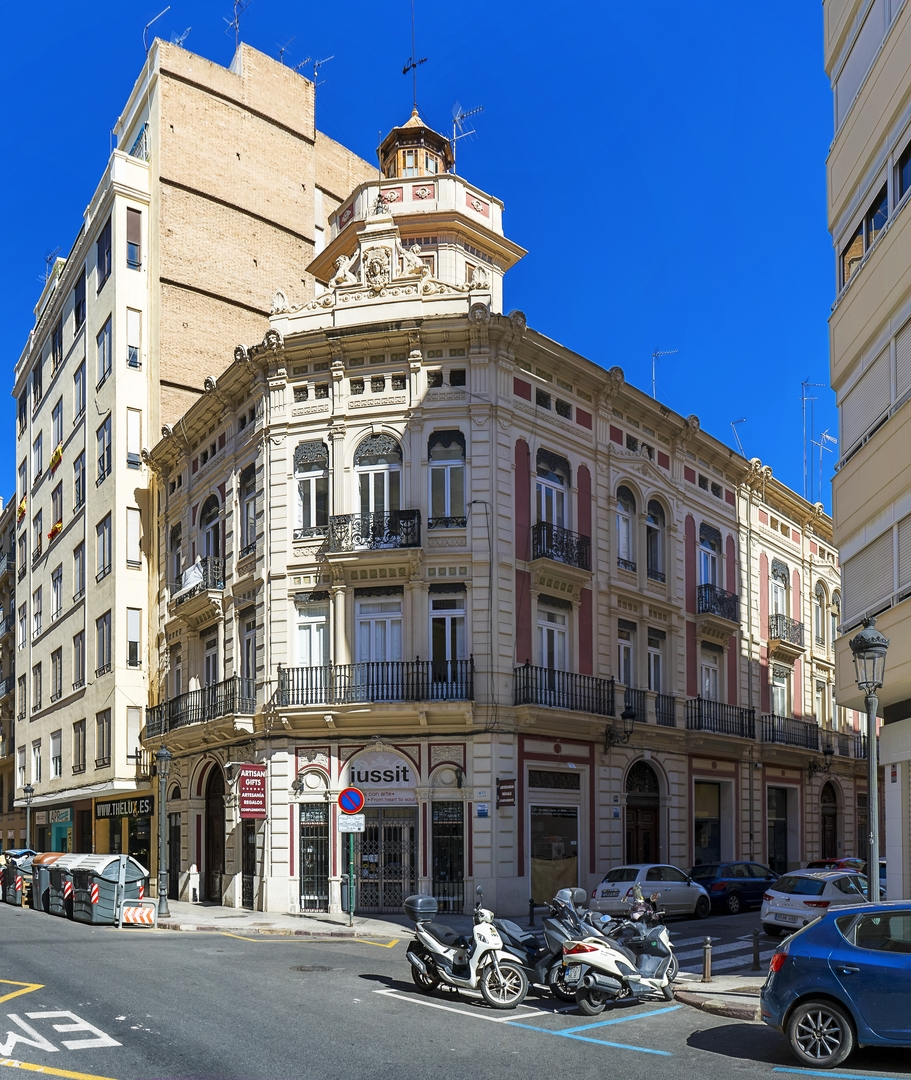 Edificio de Vicente Bochons y Llorente para Miguel Costa (1896) en la calle Quart número 163Valencia